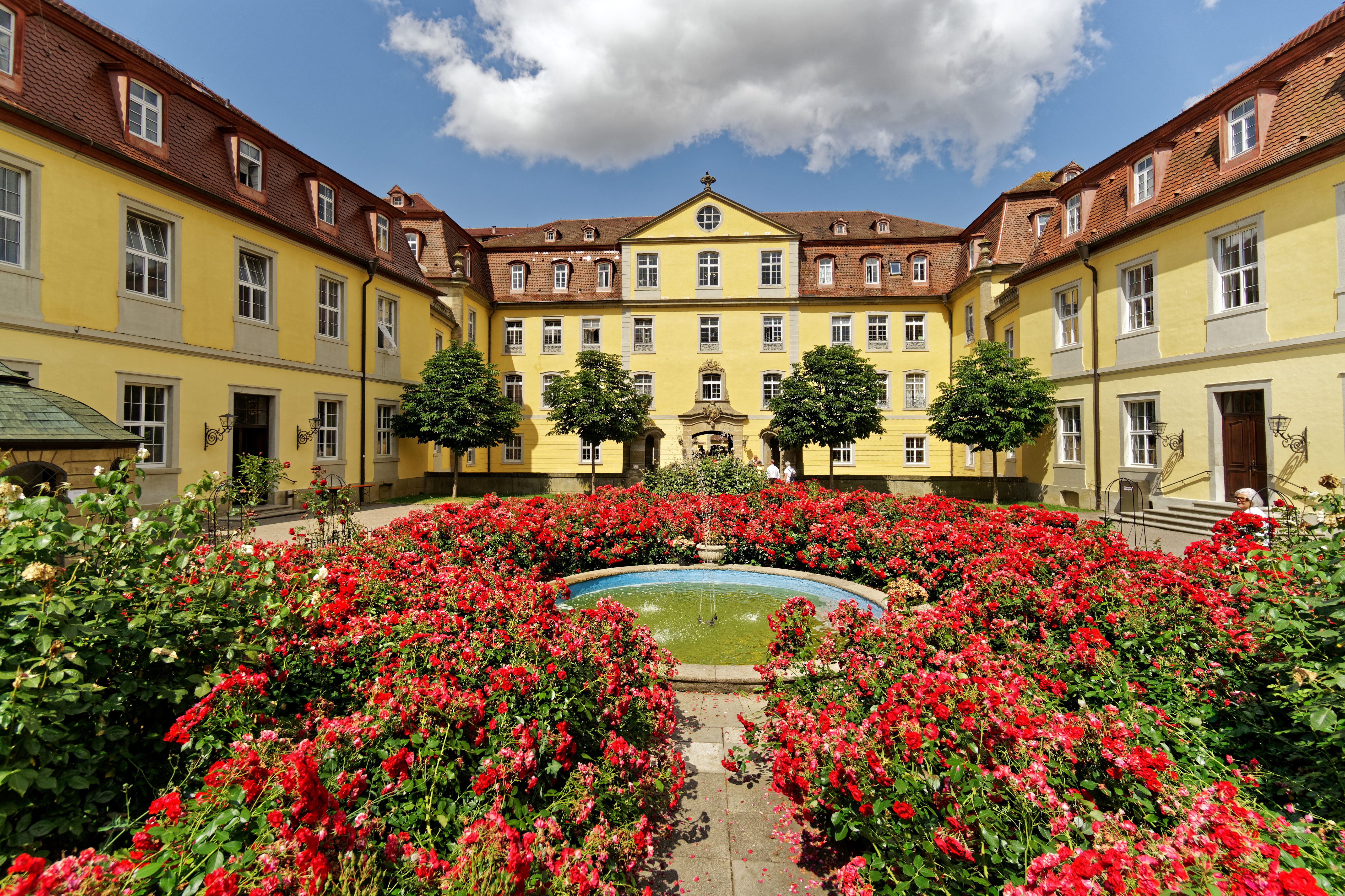 Kirchberg Castle on the Jagst.